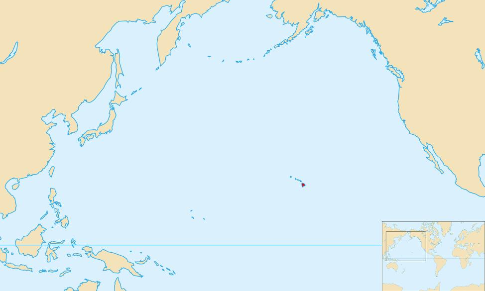 situation du volcan Mauna Kea dans le monde